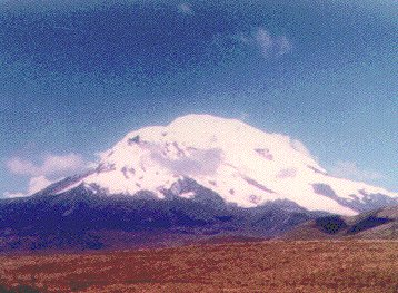 Der Chimborazo in Ecuador, Riobamba